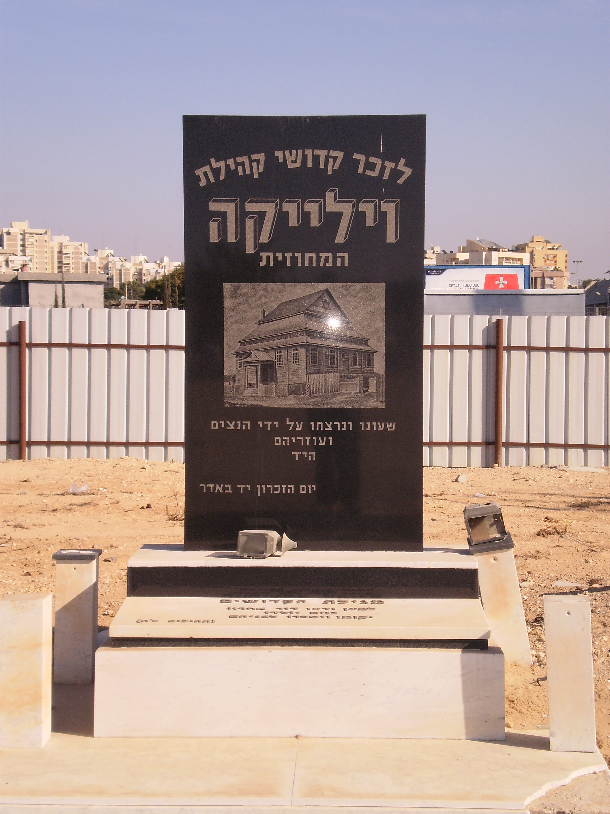 אנדרטה לזכר יהודי וילייקה שנספו בשואה, בבית העלמין הדרום